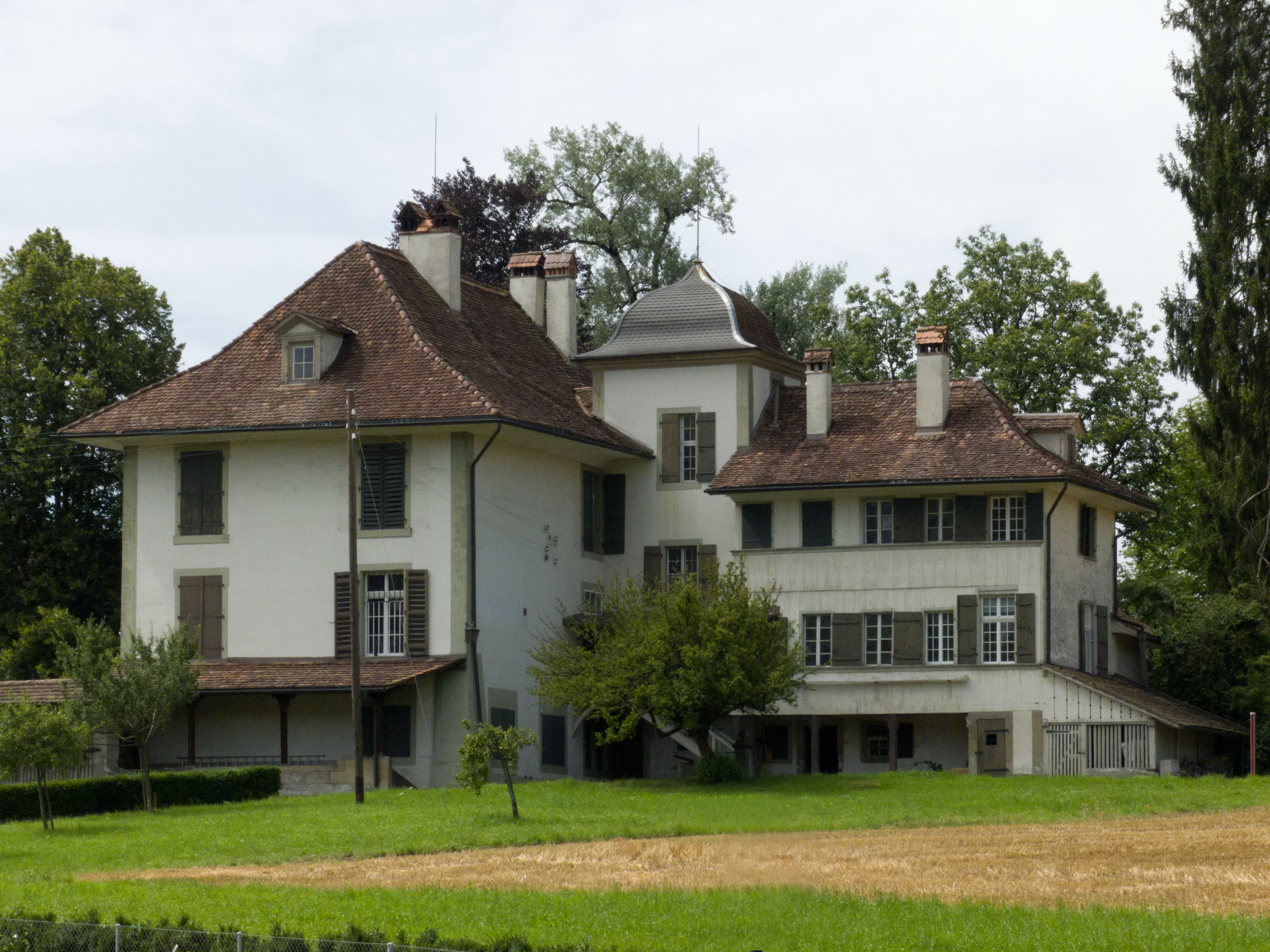 Der Patrizier-Landsitz Wegmühle, erbaut 1669 von Jakob Tillier